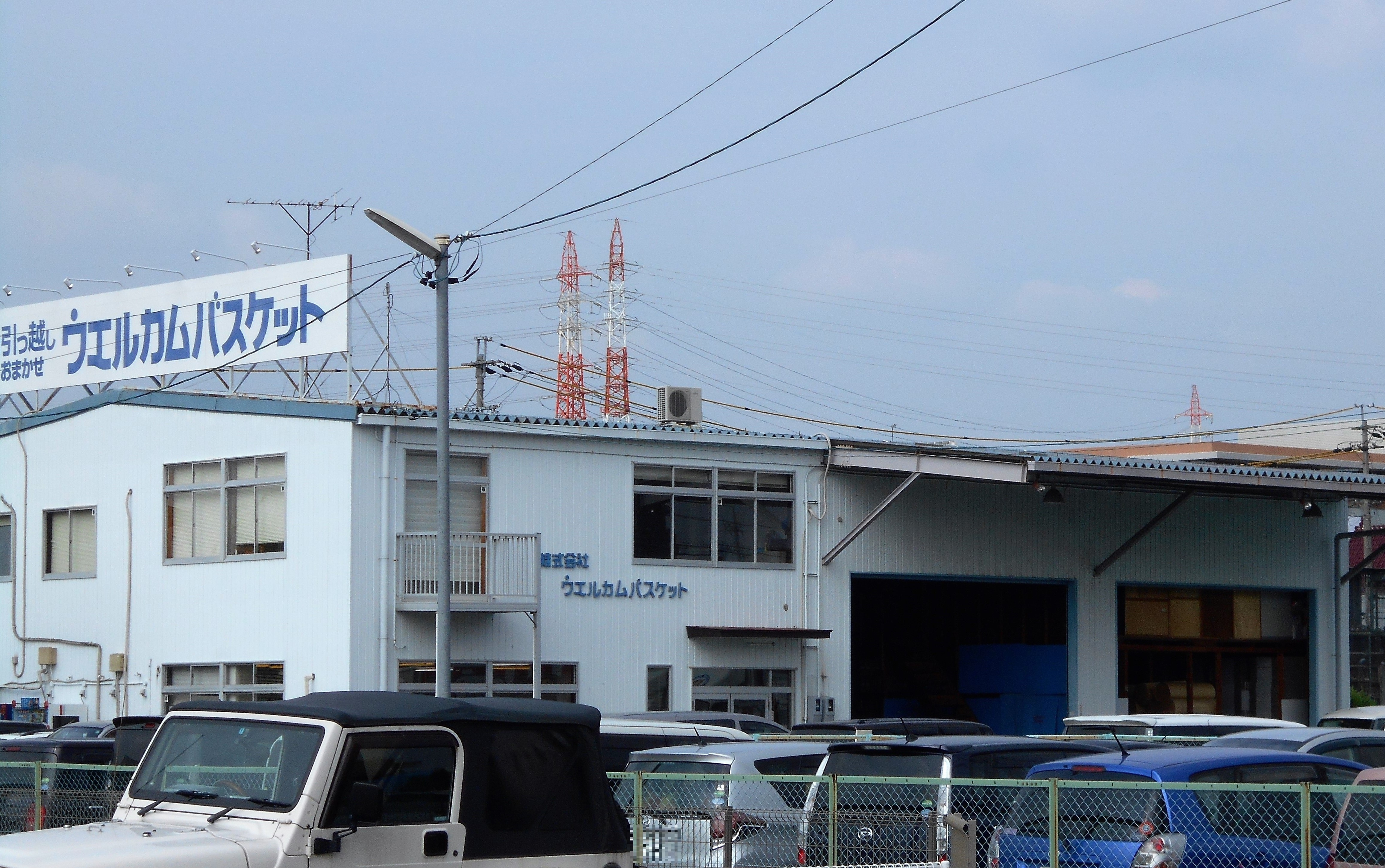 ウェルカム・バスケット本社・法人部・名東支店（2016年7月）